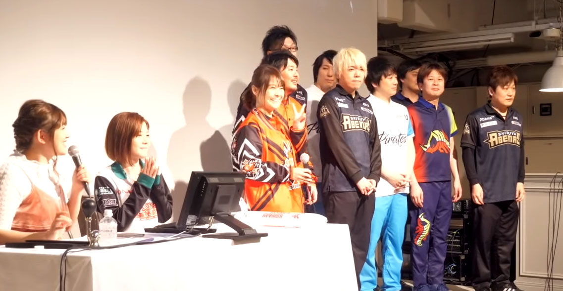 ゆりかもめ日の出駅前のイベントスペース「TABLOID」で開かれた、Mリーグのパブリックビューイングの様子。対局後、壇上に集まった選手たち。